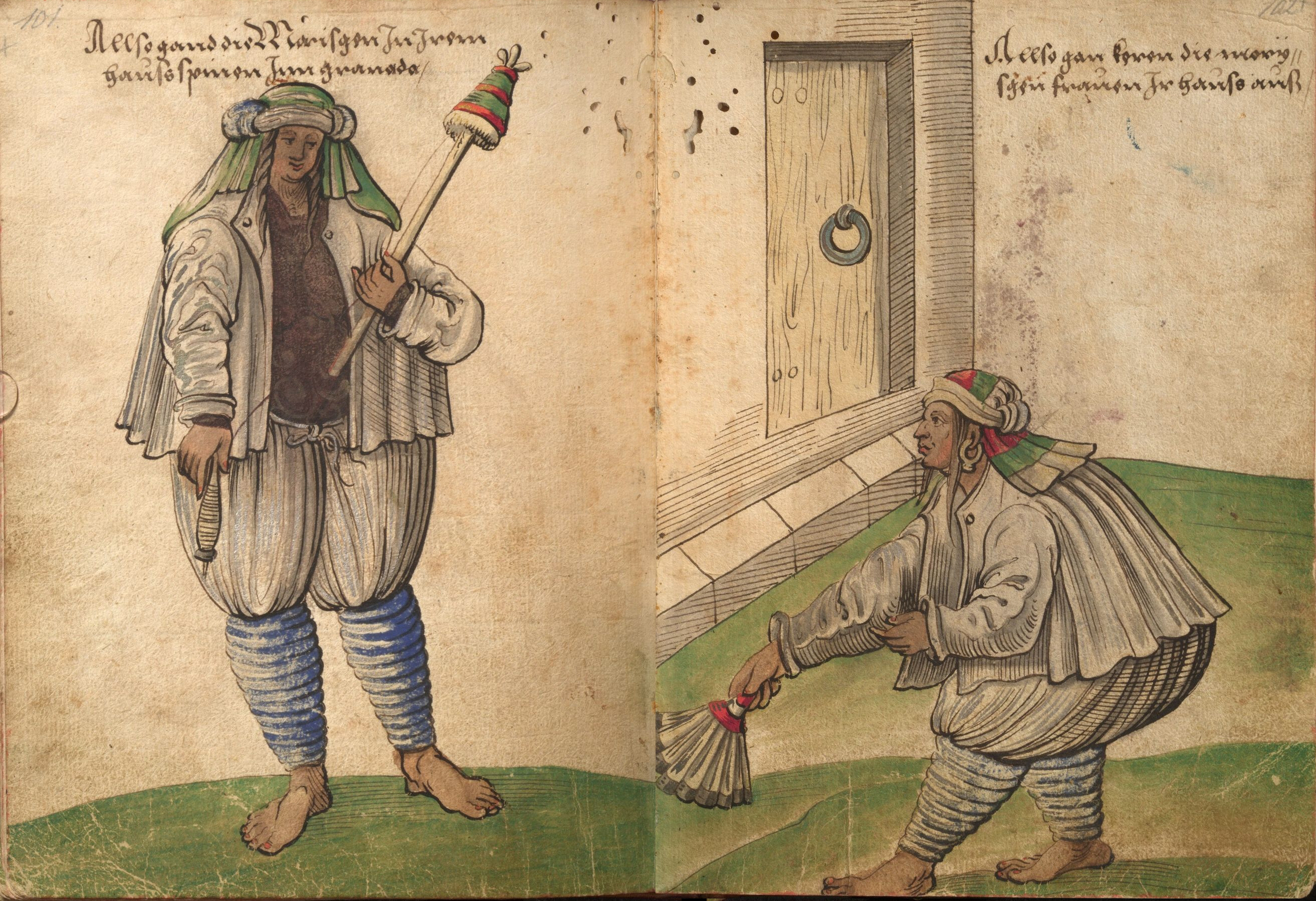 "Trachtenbuch" des Christoph Weiditz, Germanisches Nationalmuseum Nürnberg, Hs. 22474. Bl. 101-102 Wie die Morisken-Frauen in Granada zum Spinnen gehen / Wie die Morisken-Frauen ihr Haus kehren.